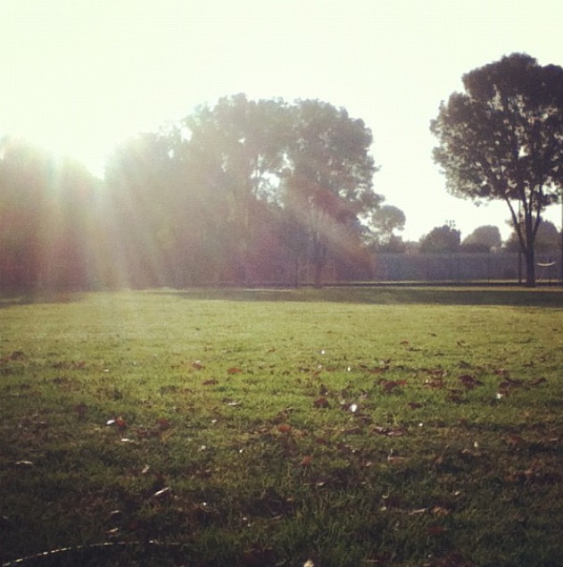 Canchas de fútbol.